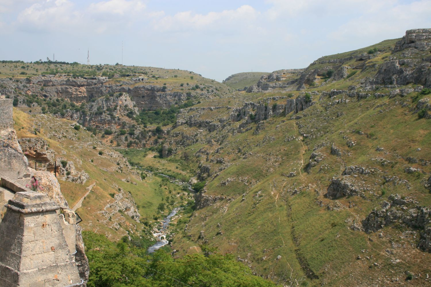 Italien/Italia/Italy: Basilicata, Prov. Matera, Gravina di Matera